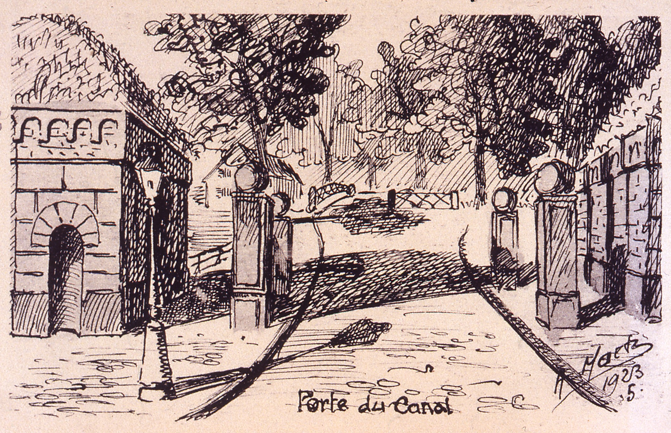 Dessin de la porte du canal à Strasbourg par A maetz